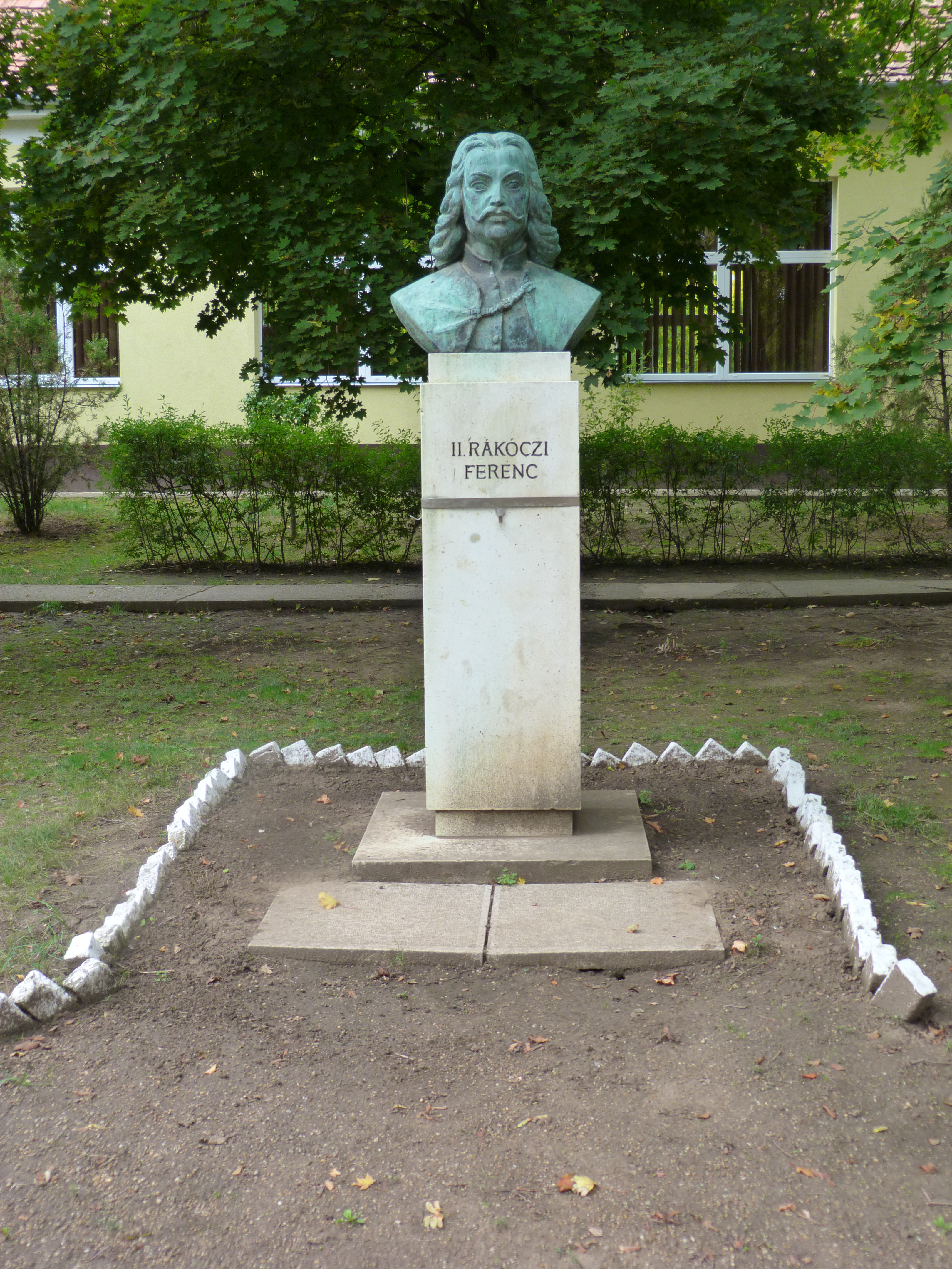 II. Rákóczi Ferenc (1964, Bányai József). A felvételek 2013. szeptember 24 -én készültek Hajdúviden. Krúdy u., a Művelődési Ház előtti parkban található.